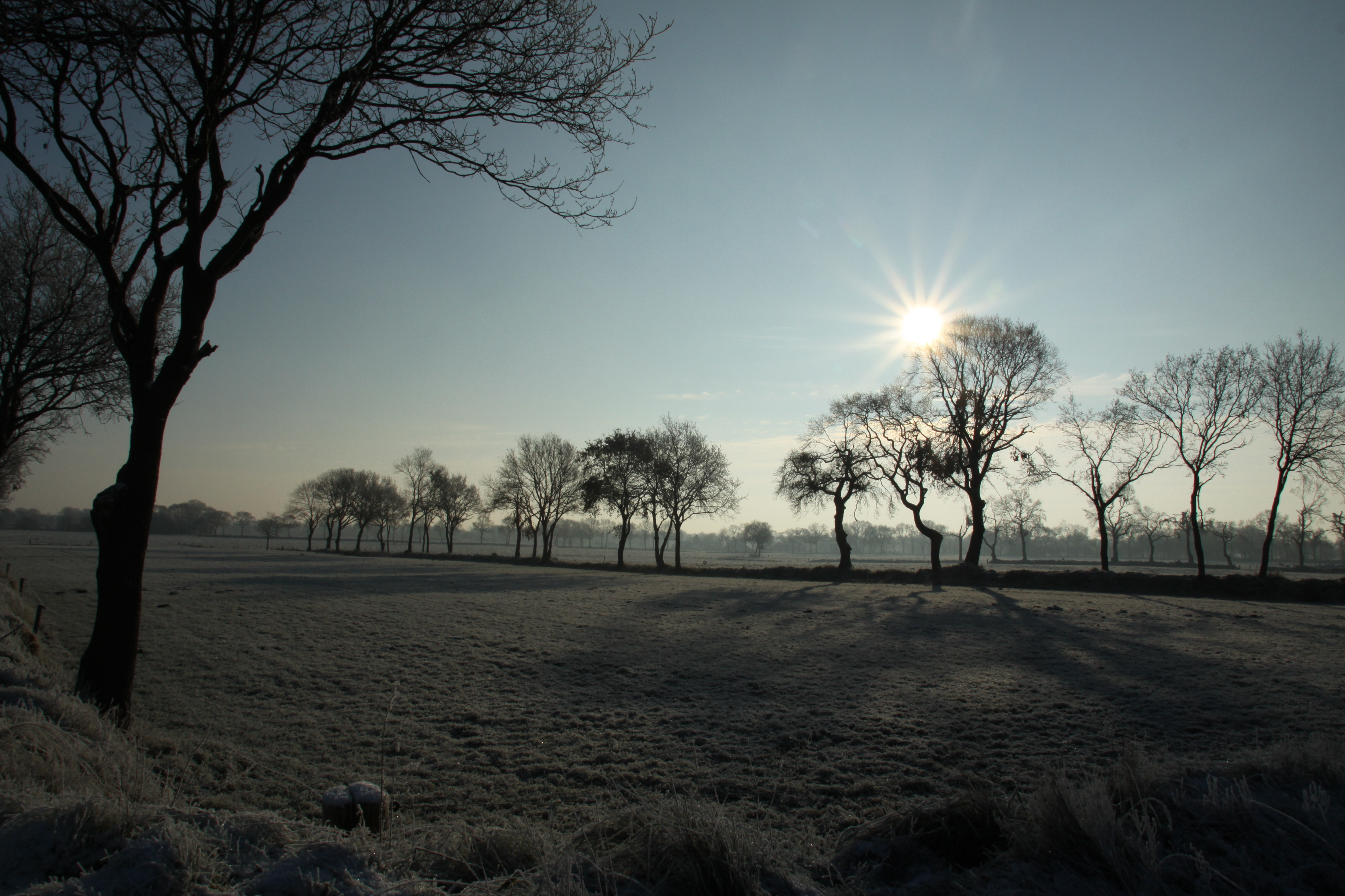 Wallheckenlandschaft in Ostrfiesland 1